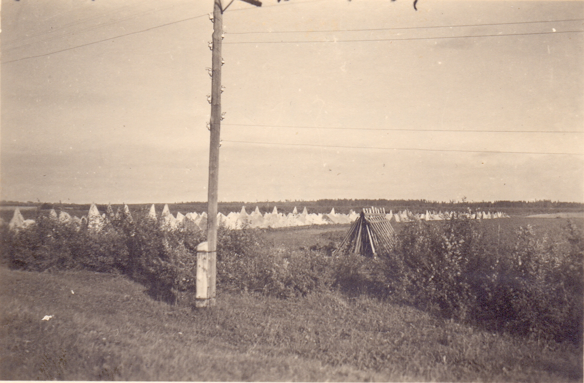 Изображена линия противотанковых надолбов, располагавшихся в окрестностях г. Красногвардейск (Гатчина) в 1941 году